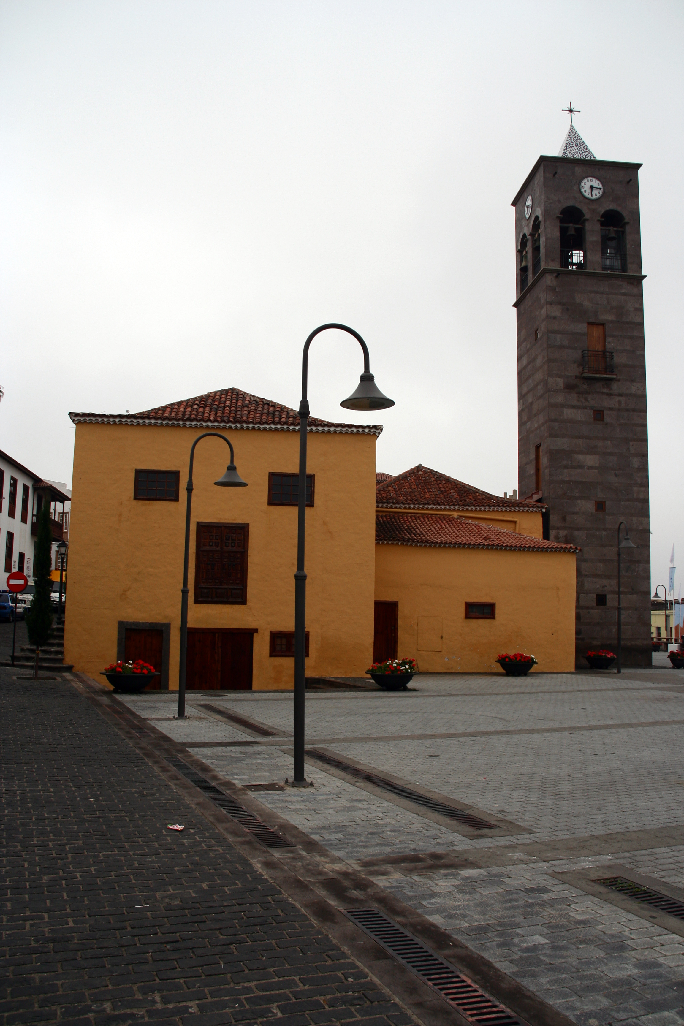 Iglesia del Dulce Nombre de Jesús en el municipio tinerfeño de La Guancha